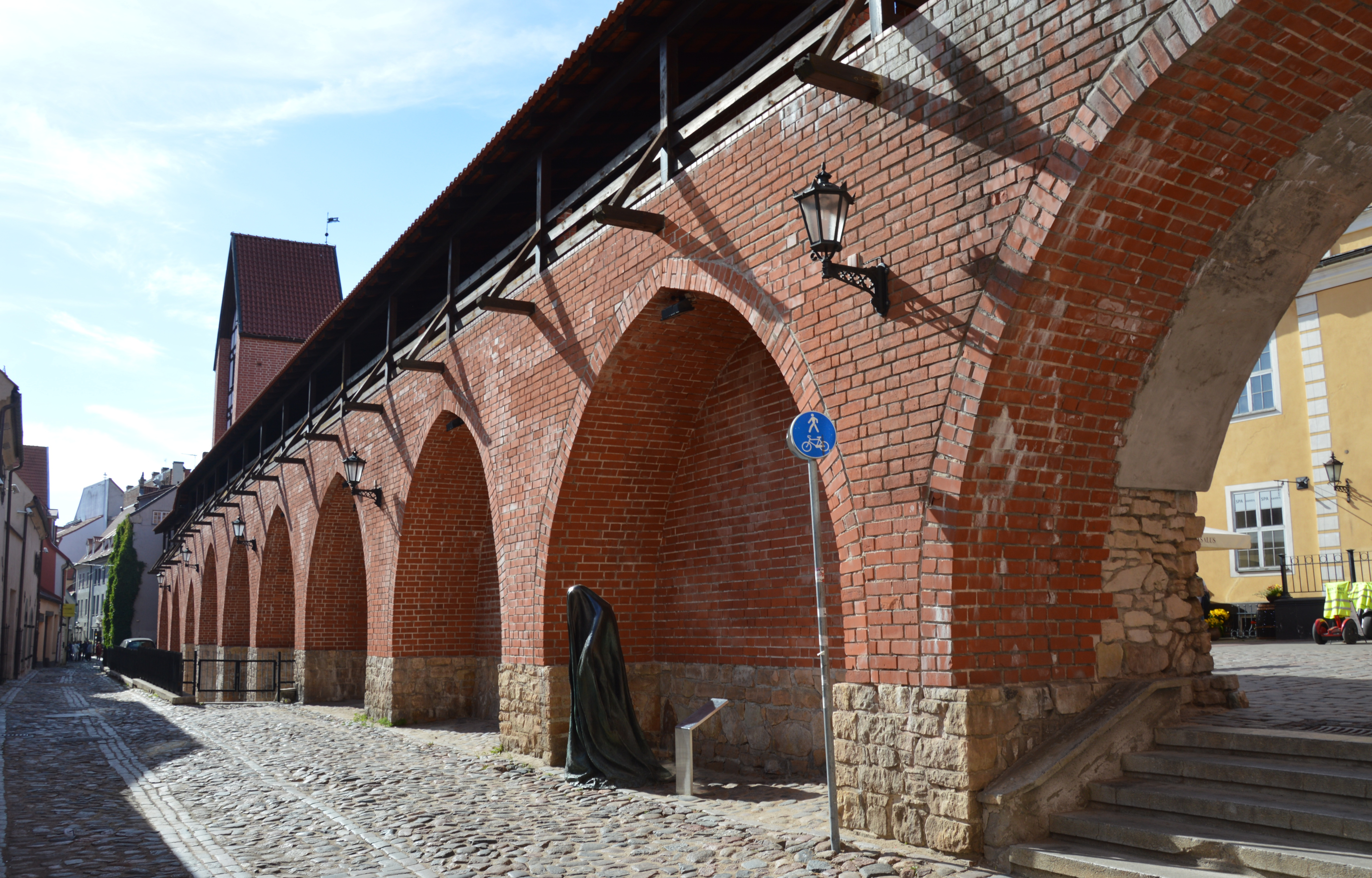 Stadtmauer Riga 2018